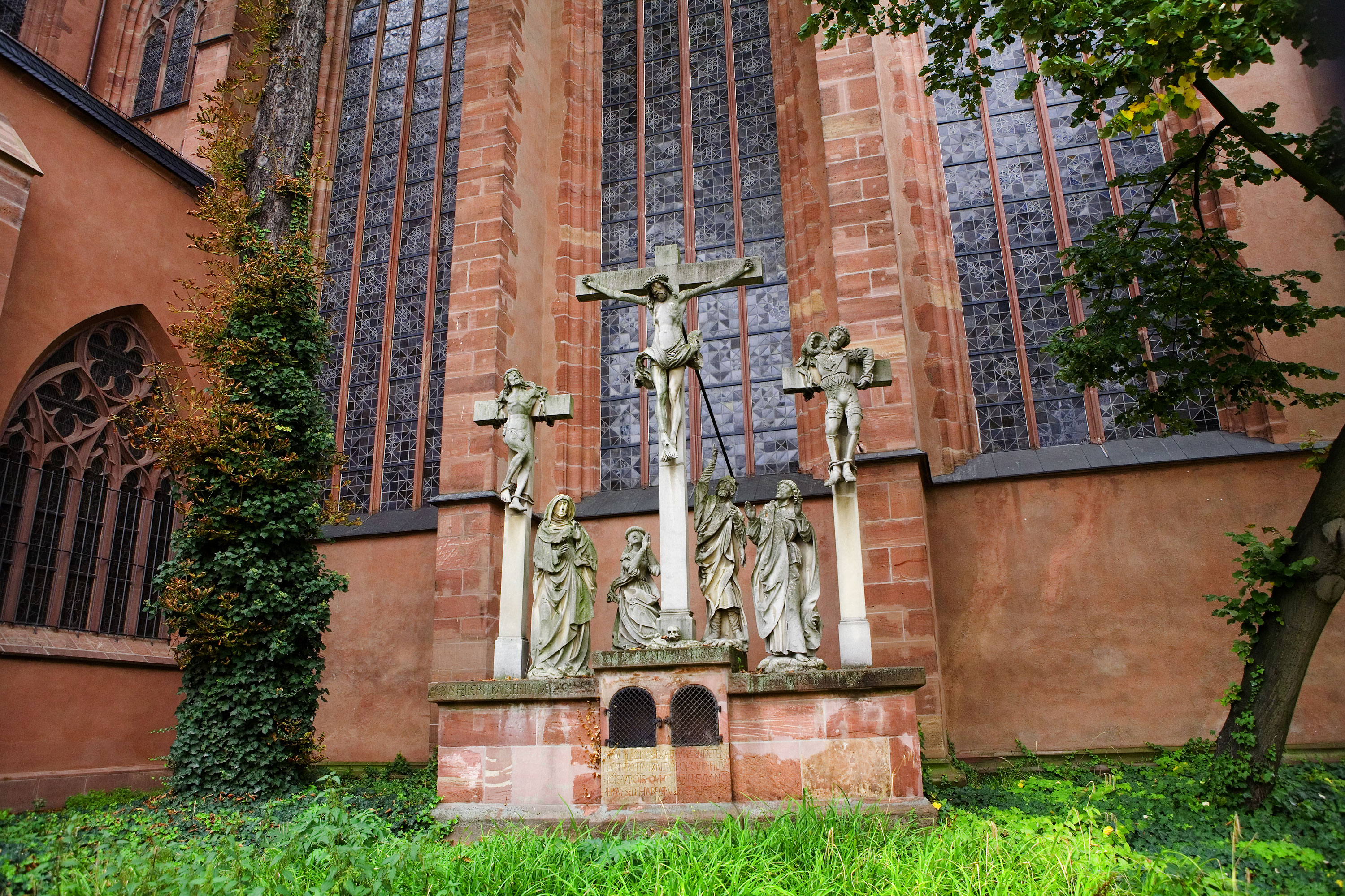 Kreuzigungsgruppe auf dem nordöstlichen Friedhofsgelände des Frankfurter Kaiserdoms St. Bartholomäus. Die Originale der 1509 von Hans Backoffen geschaffenen Skulpturen befinden sich seit 1919 im Inneren der Kirche, im Bild ist eine Kopie zu sehen.